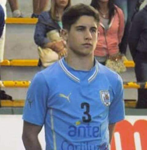 AgustinRobinson SelUruguaya